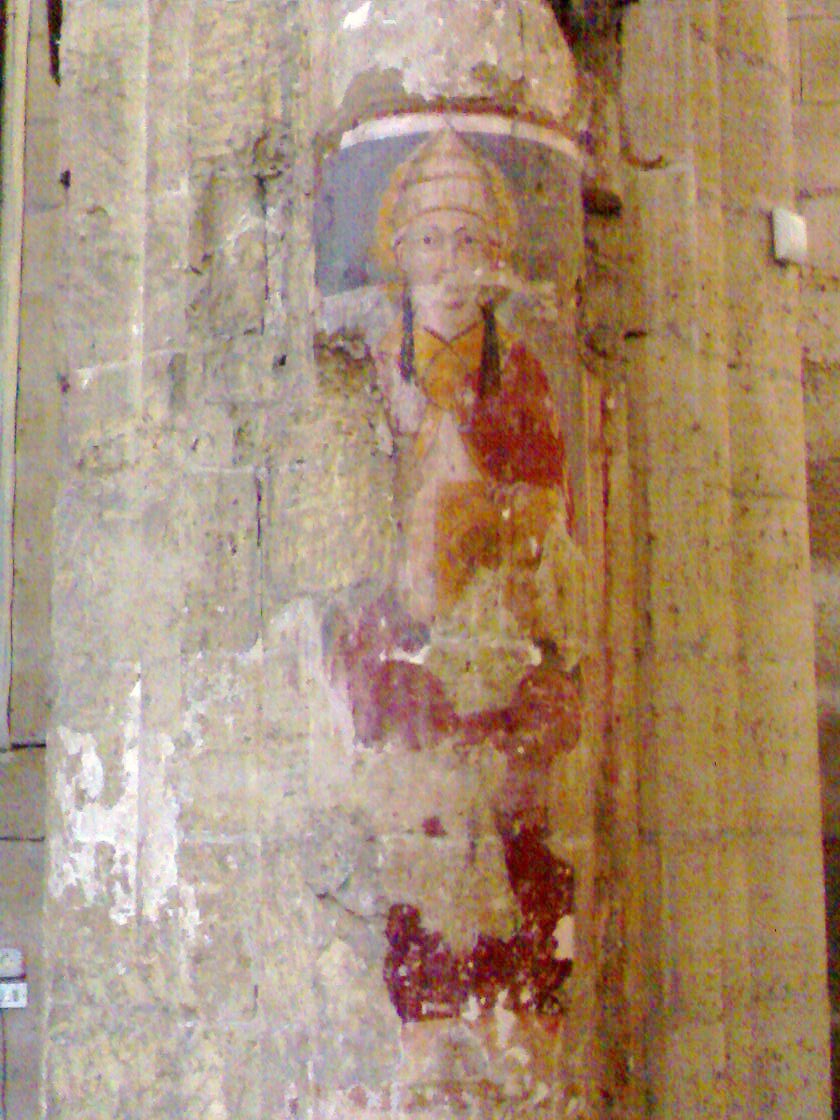 Interno Eligio Maggiore